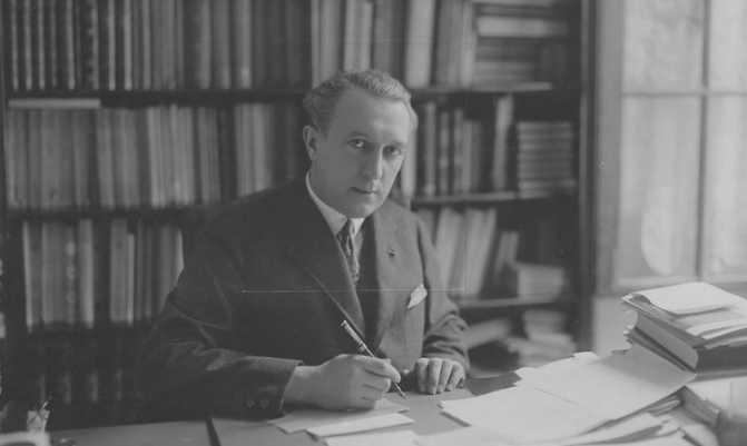 Musicologist Zdzisław Jachimecki